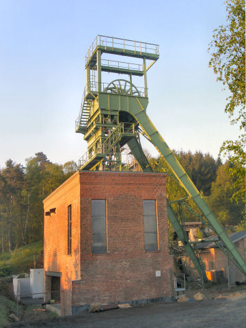 Konservierter Förderturm am Lüderich bei Overath-Steinenbrück